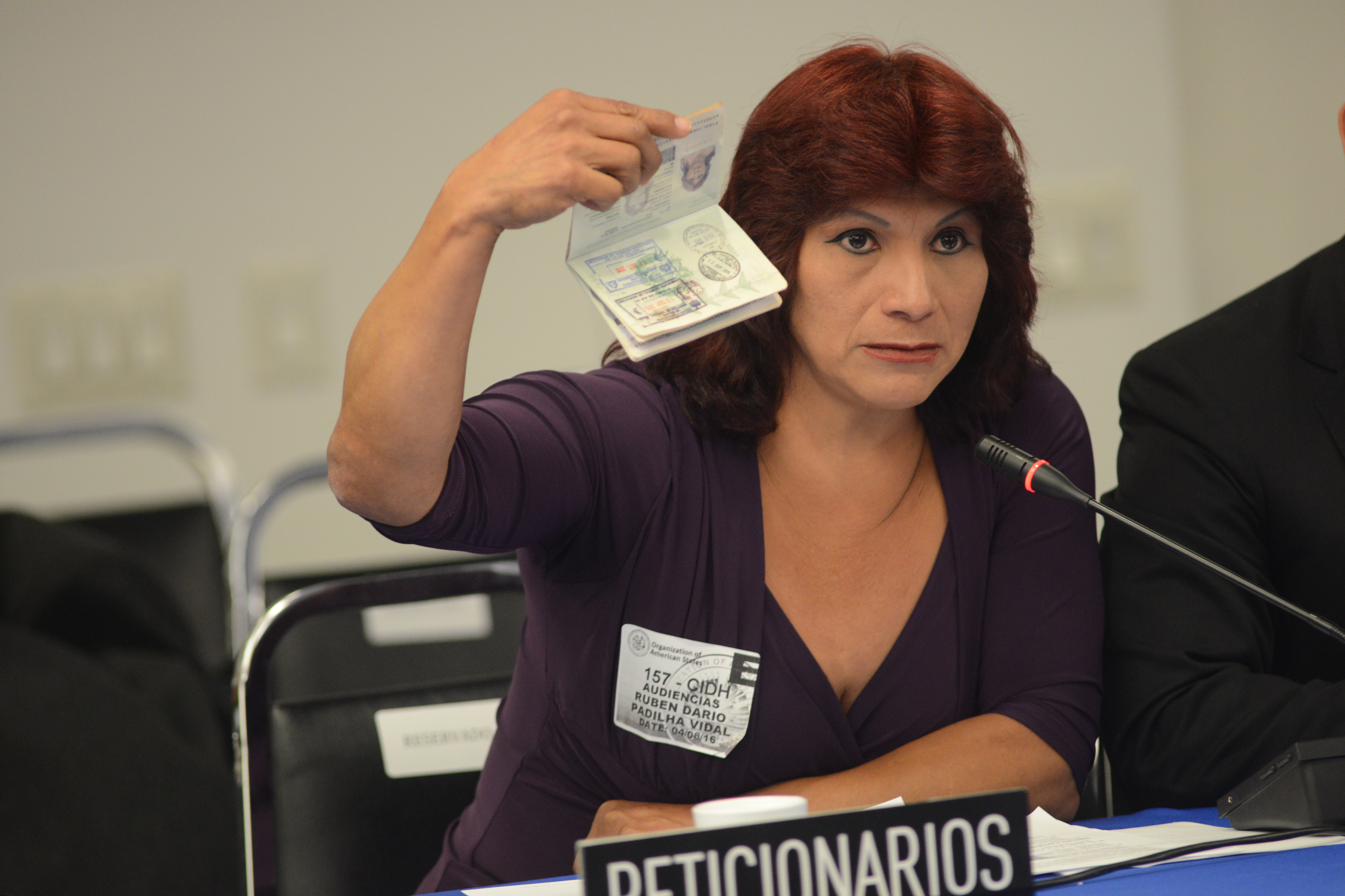 Rayza Torreani de REDTREBOL, Bolivia, actuando como peticionaria ante la Comisión Interamericana de Derechos Humanos, por los derechos LGBT, durante el 157 Período Ordinario de Sesiones.